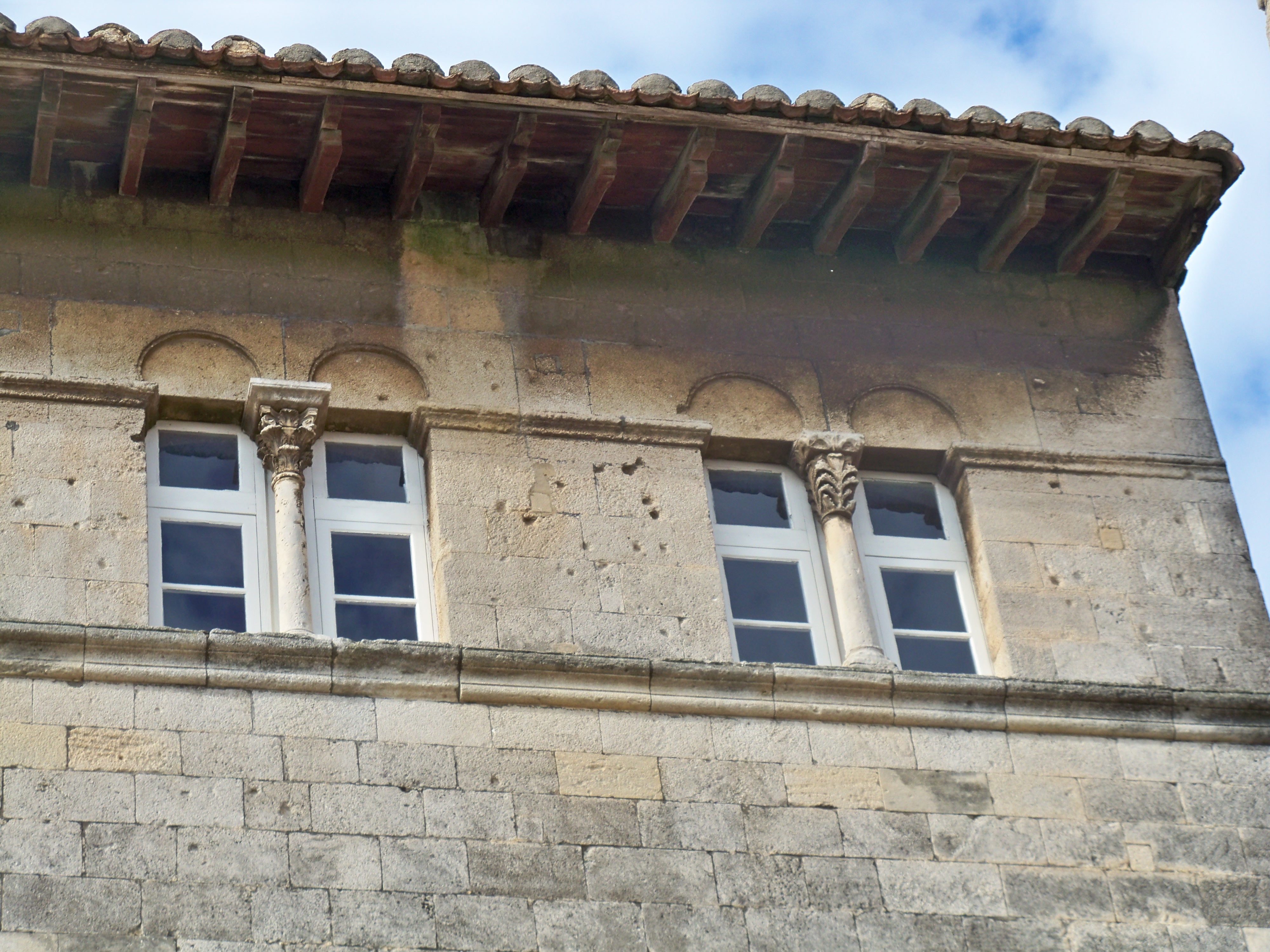 détail de la maison romaine à Saint Gilles (30)